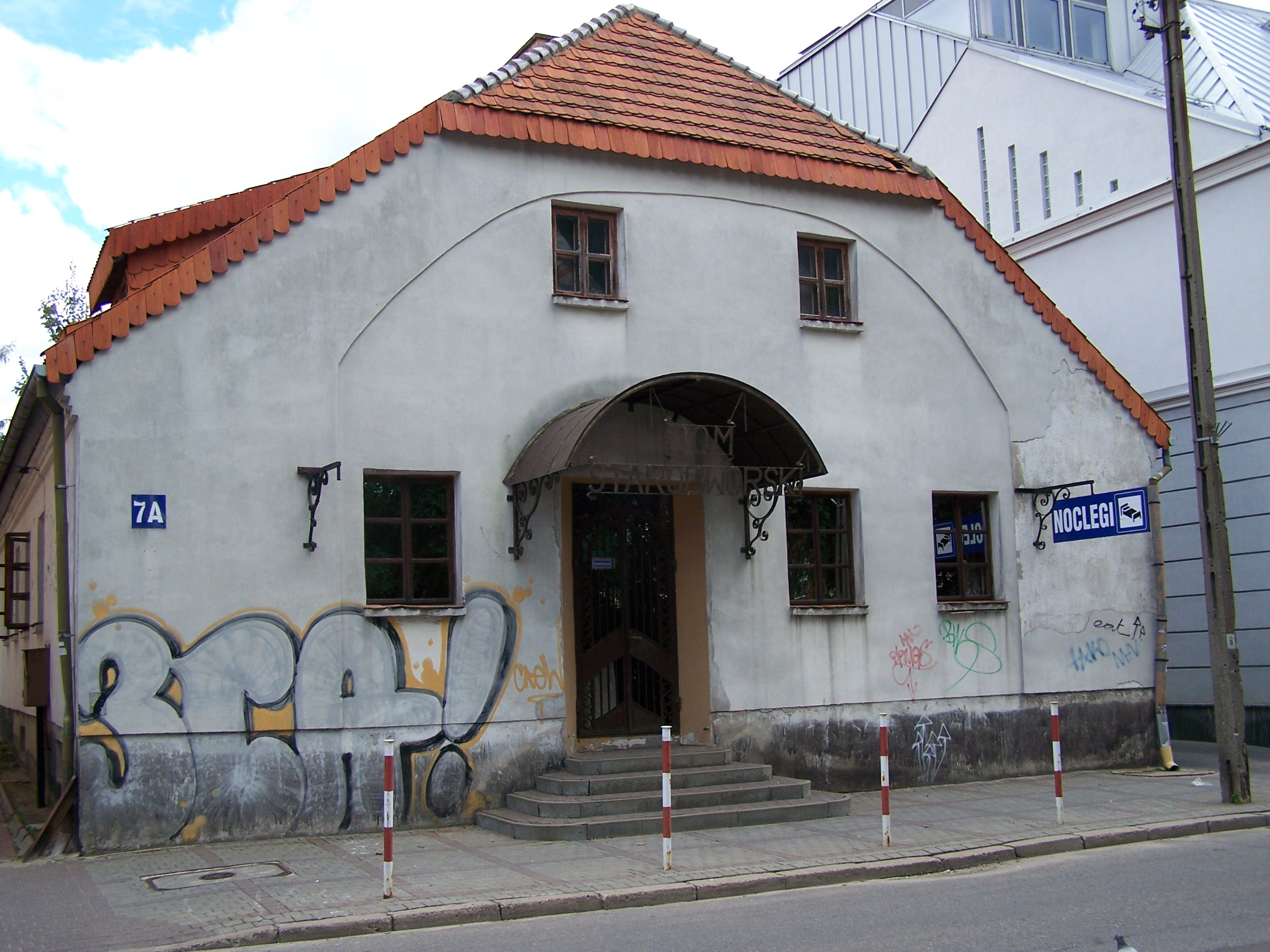 Białystok, ul. Warszawska 7A - "Dom starodworski", pocz. XIX w. (zabytek nr A-175 z 30.06.1959)